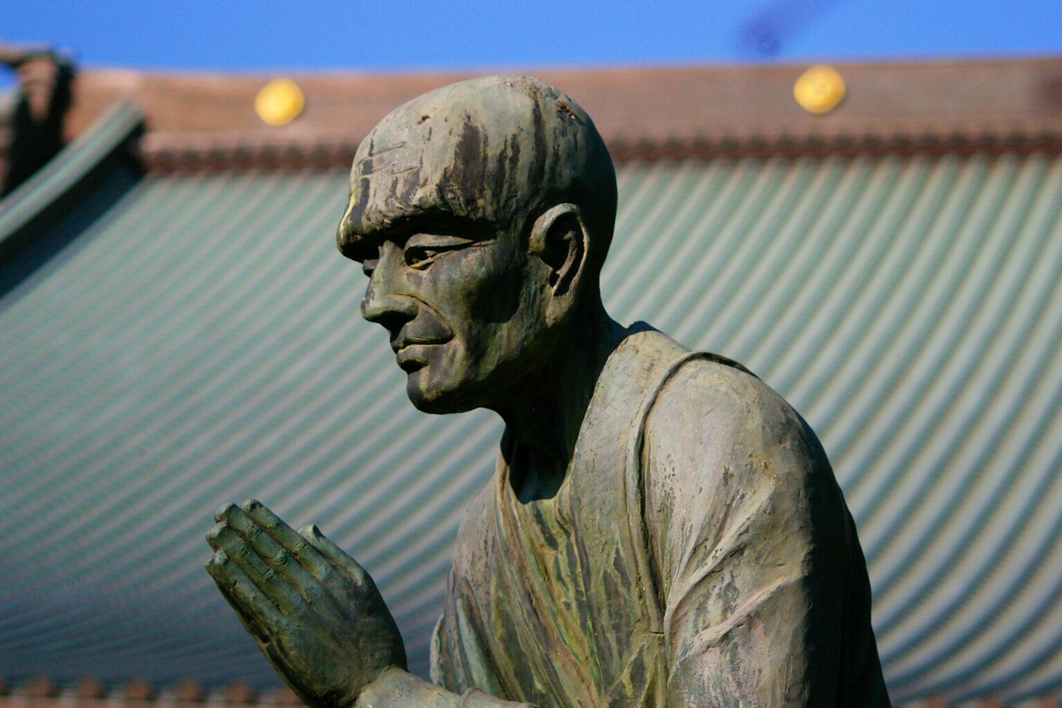 藤沢市、清浄光寺、一遍上人像。露出調整したもの。